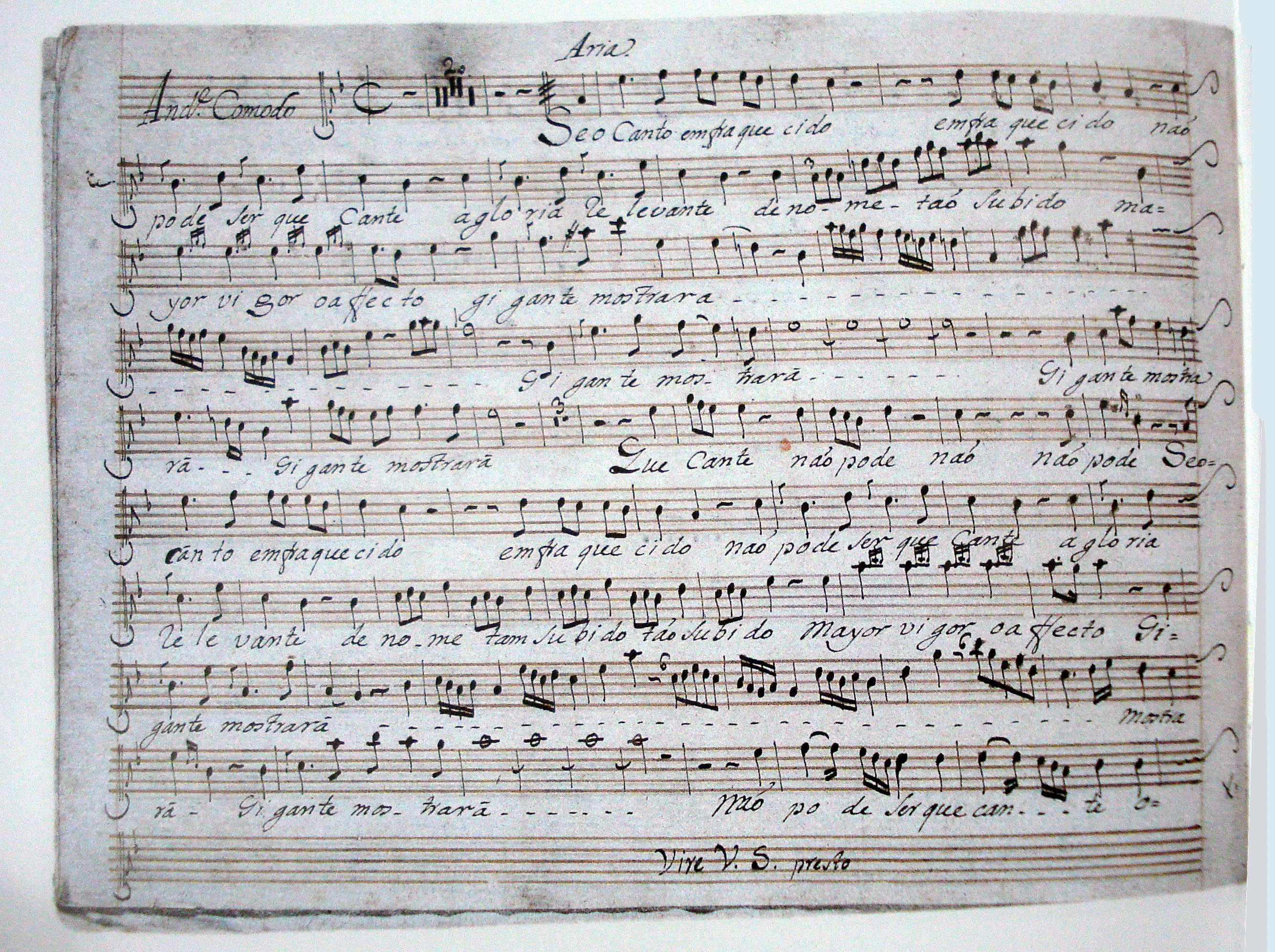 partitura da ária Se o canto enfraquecido...